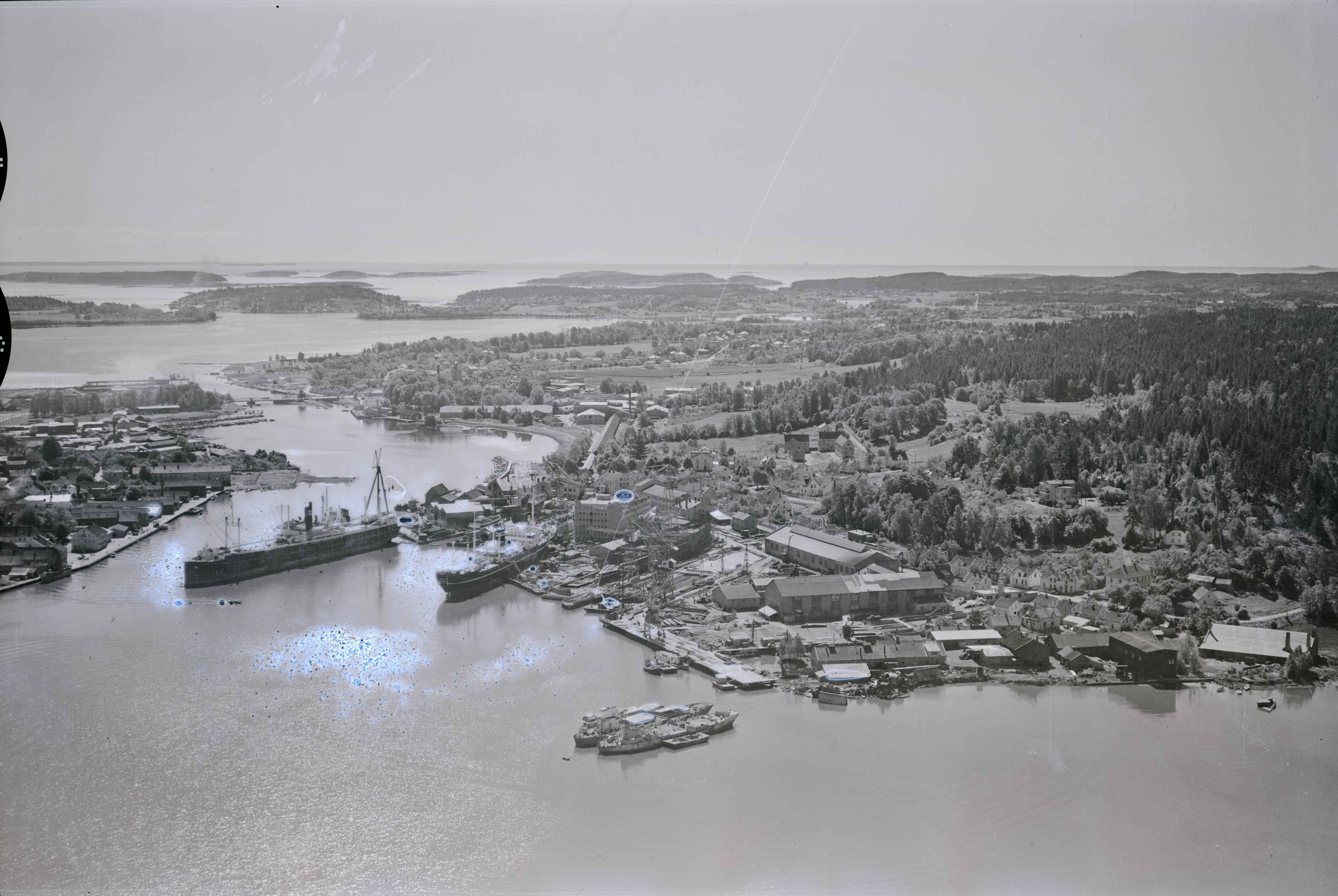 Widerøe skråfoto fra Tønsberg kommune. Fartøyet ved utrustningkaien er MS THALATTA Kaldnæs bygg nr 133 fra 1951.